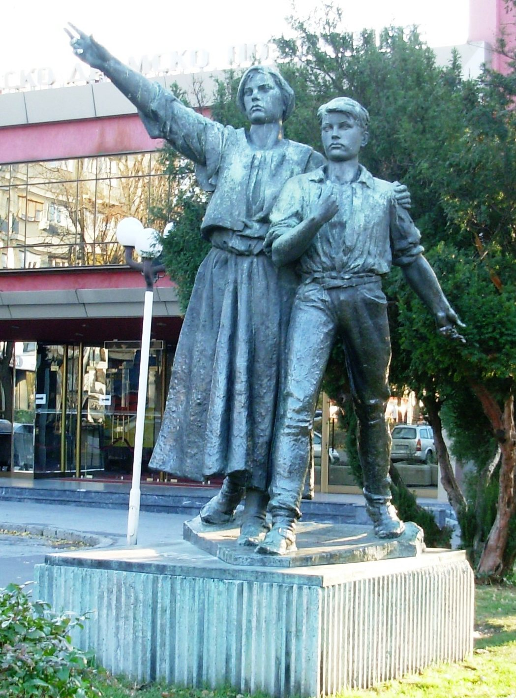 Типична соцреалистичка уметност. Кип ипред Савременог позоришта на Црвеном крсту, Београд. Сликао Голдфингер